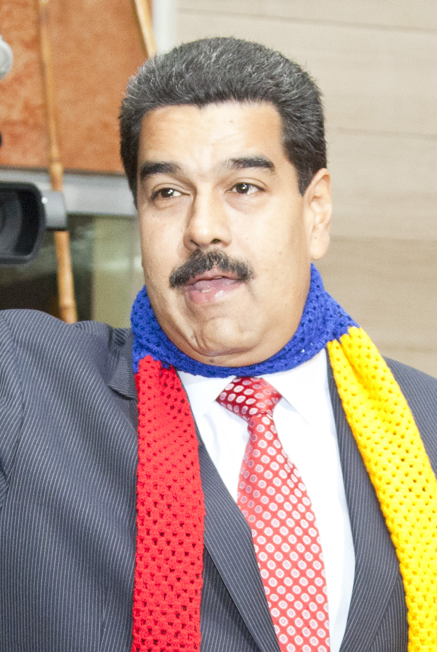 Quito (Ecuador), 24 de mayo 2013. Nicolás Maduro, Presidente de Venezuela, a su ingreso a la Asamblea Nacional, donde se realizó el acto de posesionamiento del Presidente de la República del Ecuador, Rafael Correa Delgado. Foto: Fernanda LeMarie - Cancillería del Ecuador.